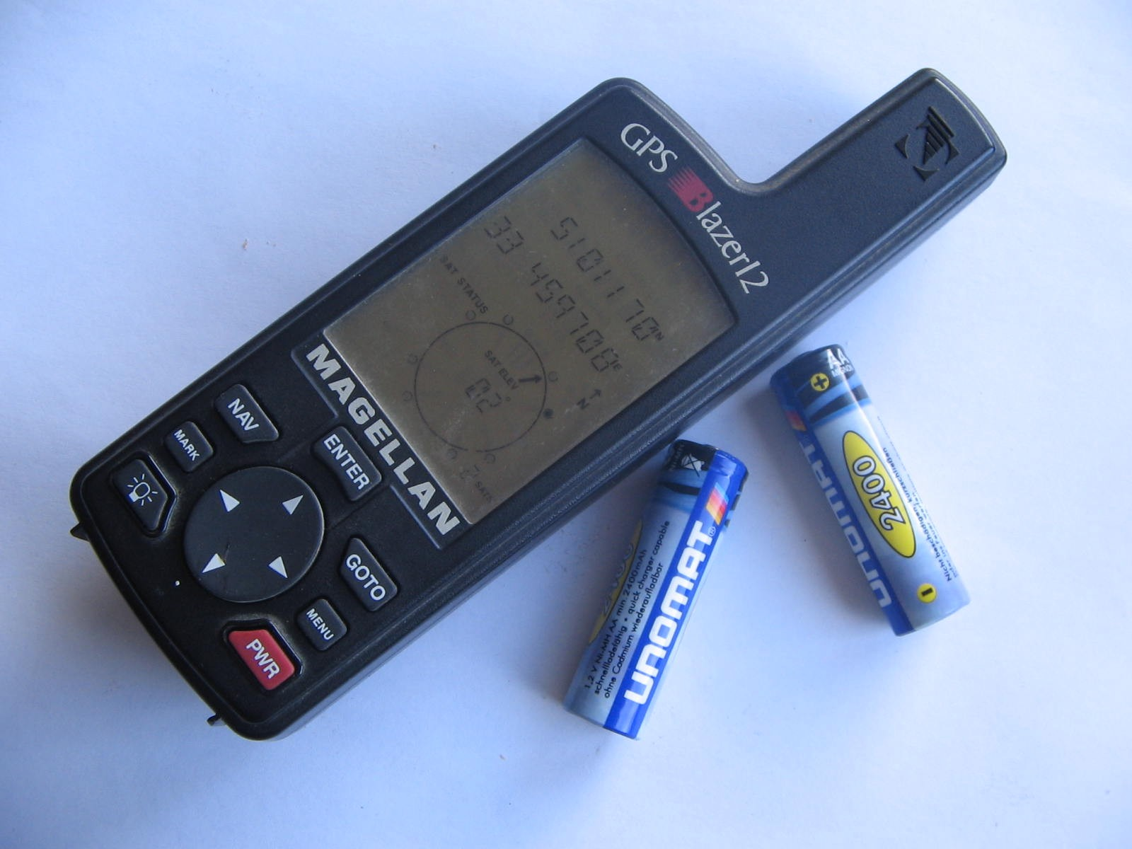 Magellan GPS Blazer12. GPS sprejemnik za civilno uporabo. Na zaslonu je lokacija v UTM (univerzalne transverzalne Merkalijeve) koordinatah in smer (azimut) proti izbrani točki (cilju).